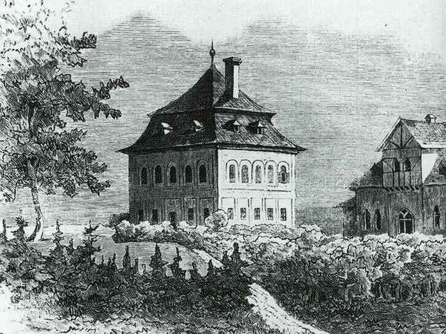 Teleki-kastély (Koltó). Jókai Mór rajza